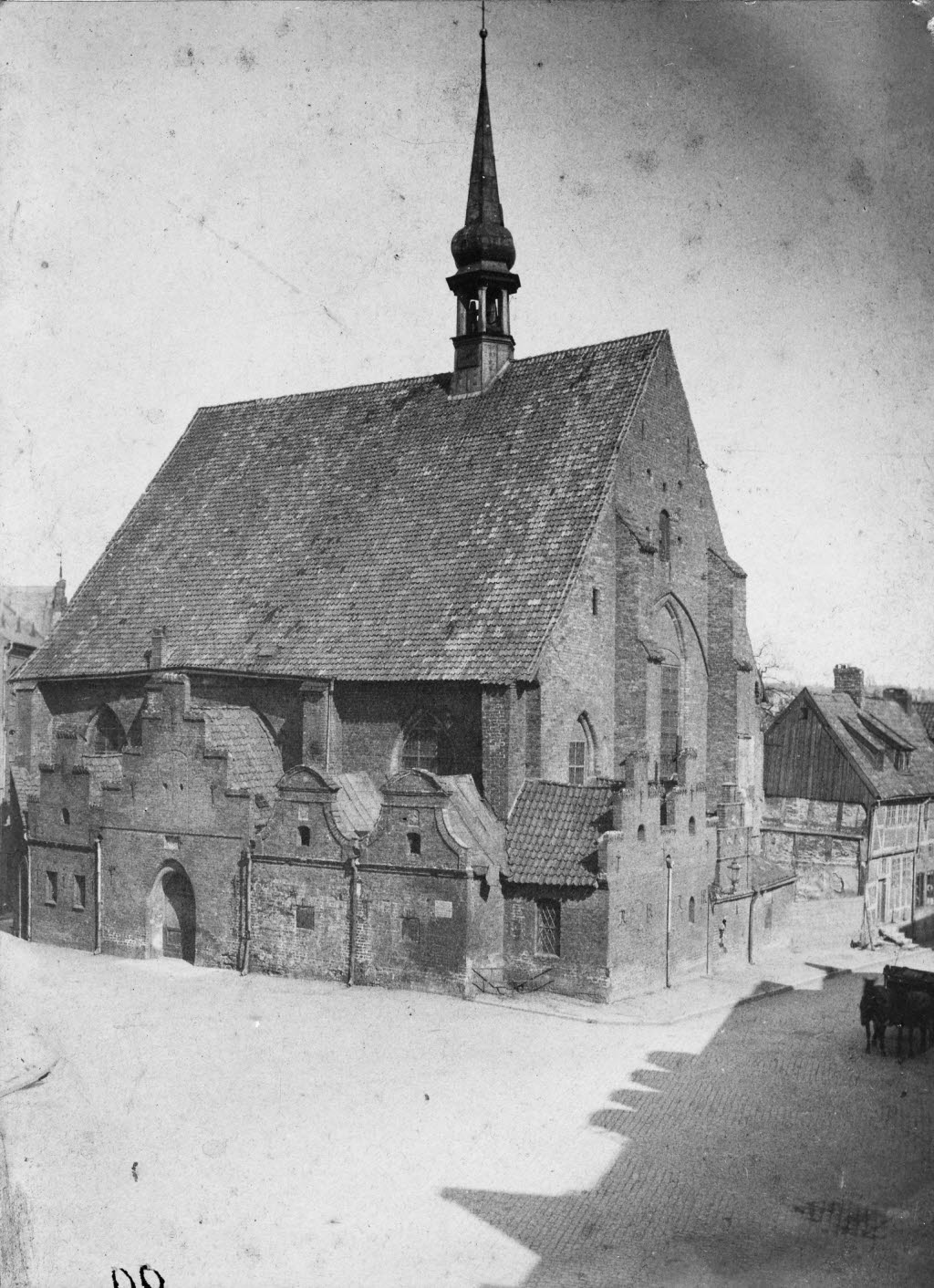 Klosterkirche in der Falckstraße